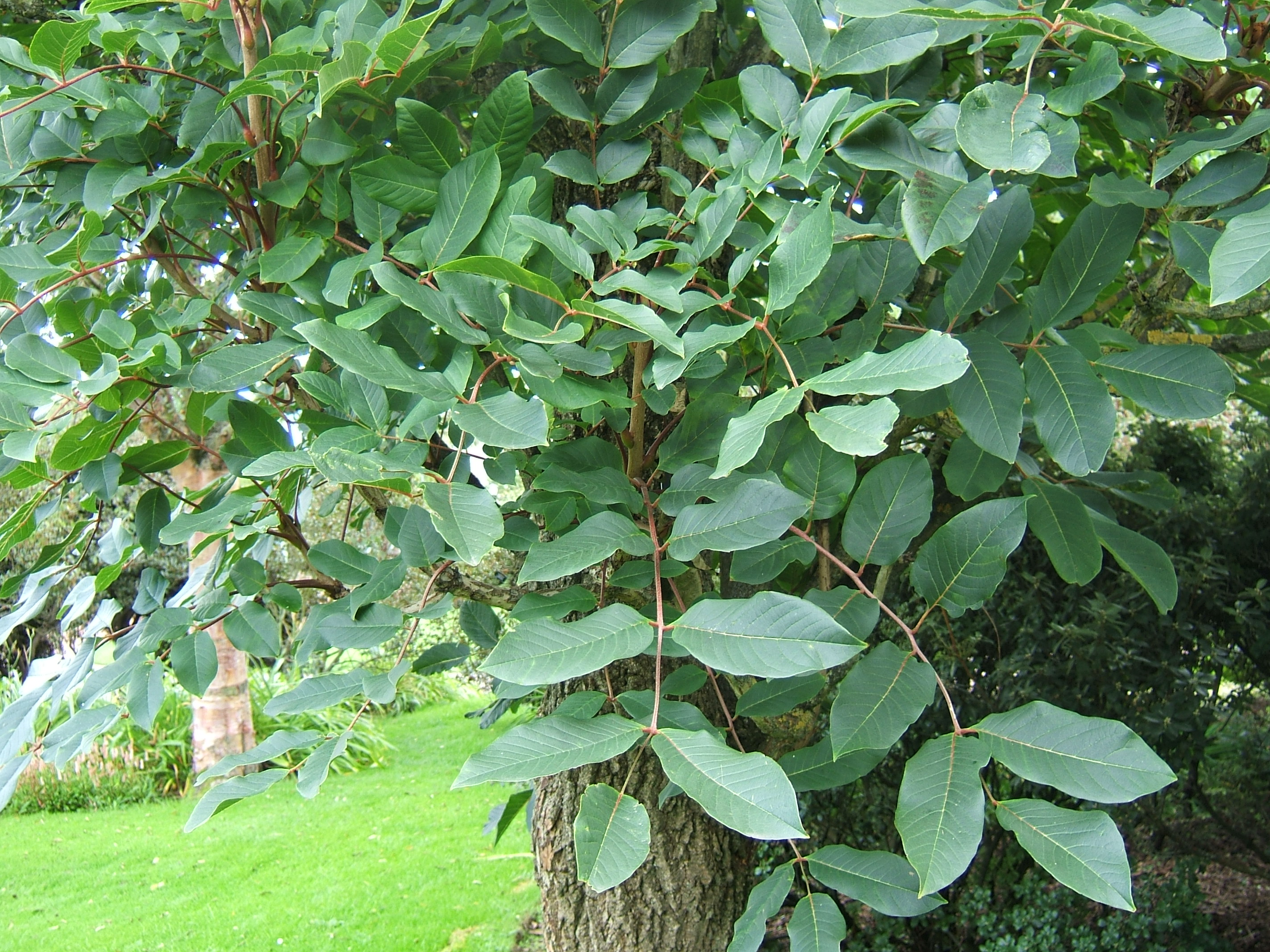 Meliosma veitchiorum (Sabiaceae), cultivated UK